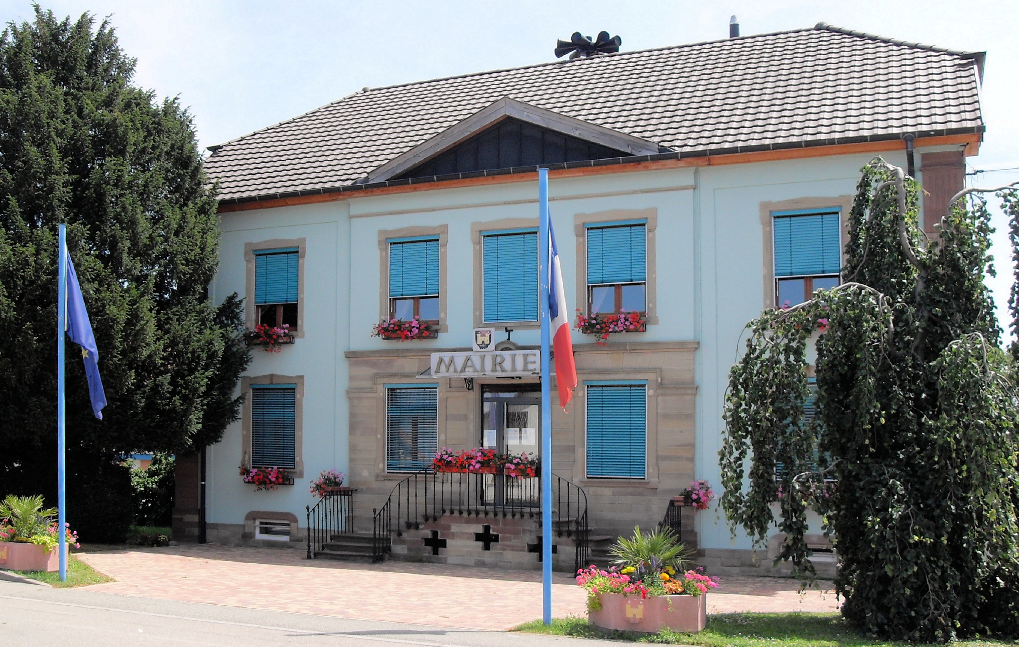 La mairie de Heiteren